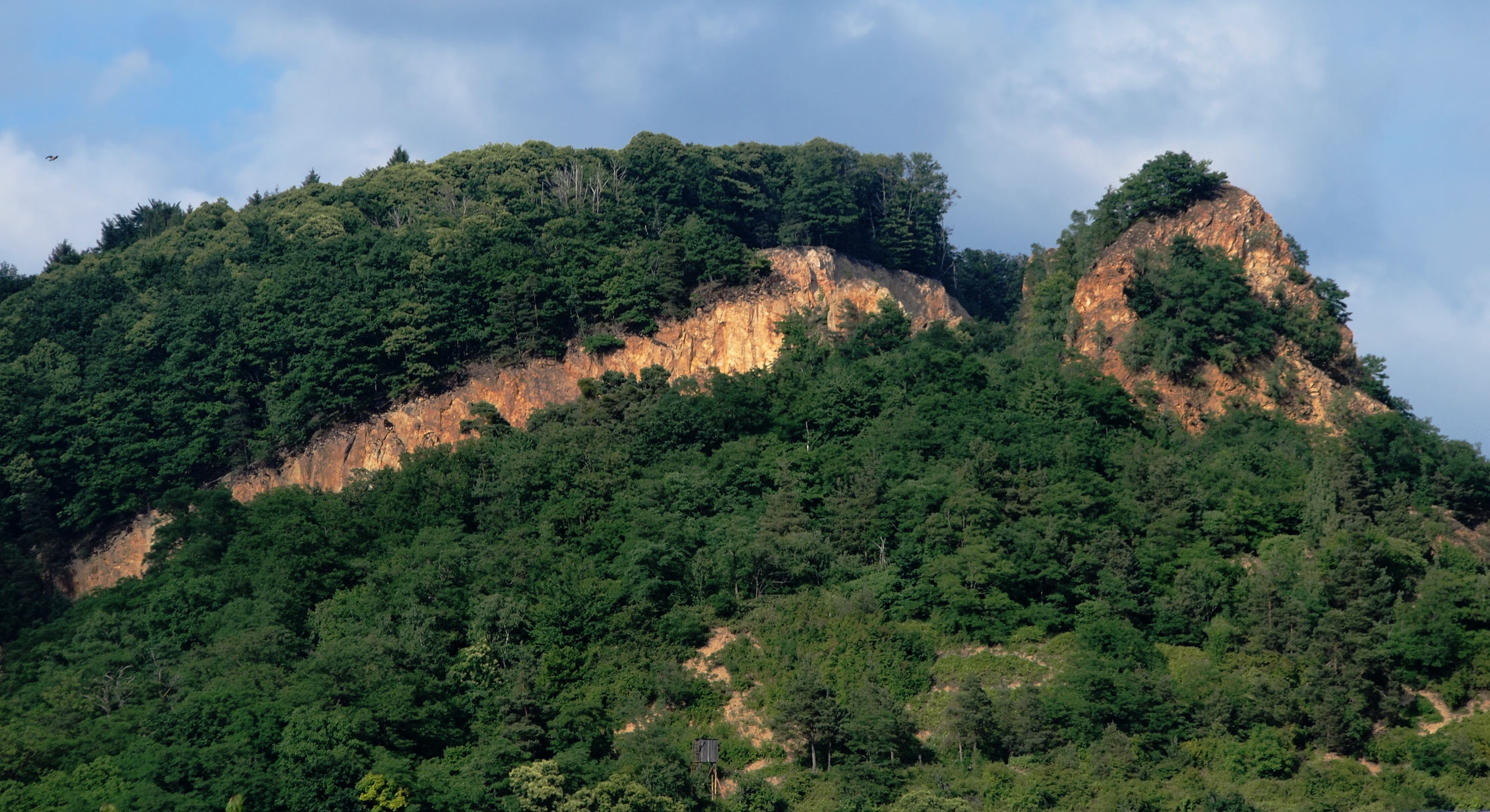 Sporenberg am Odenwaldrand bei Dossenheim mit Steinbruchspuren